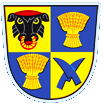 znak obce Čehovice.